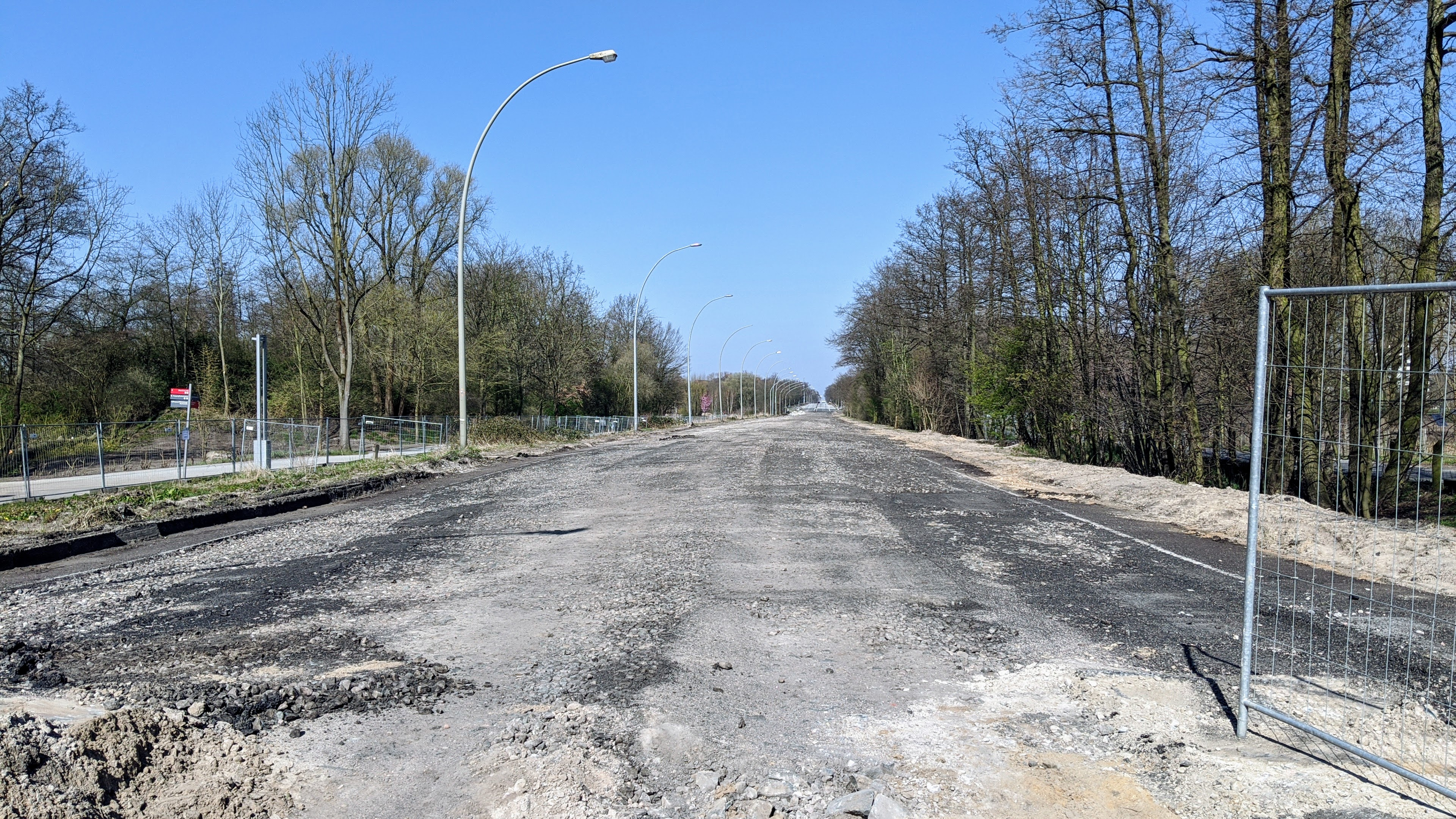 Wilhelmsburger Reichsstraße, ehemalige alte Trasse